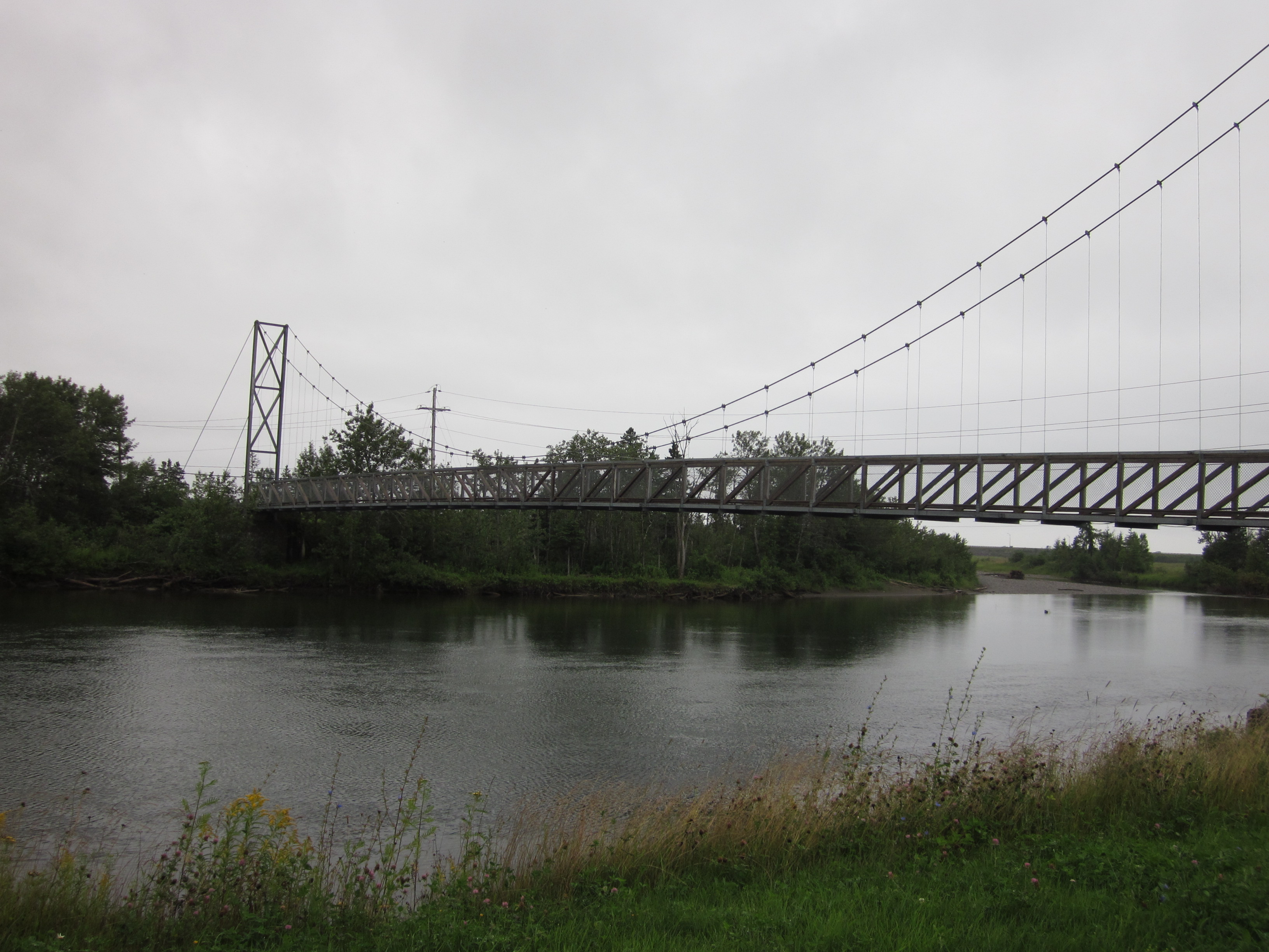 Passerelle suspendue sur la rivière Bonaventure dans la réserve aquatique de l’Estuaire-de-la-Rivière-Bonaventure à Bonaventure